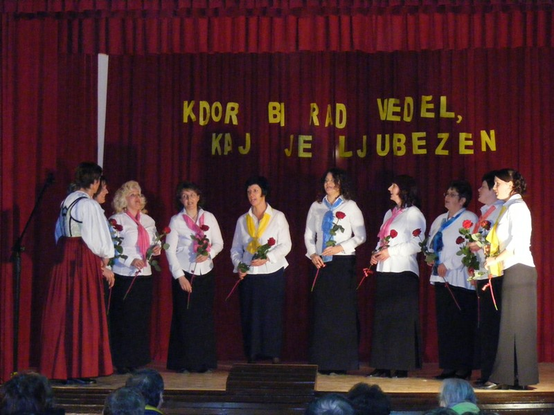 Ženski pevski zbor Dobrnič, november 2007